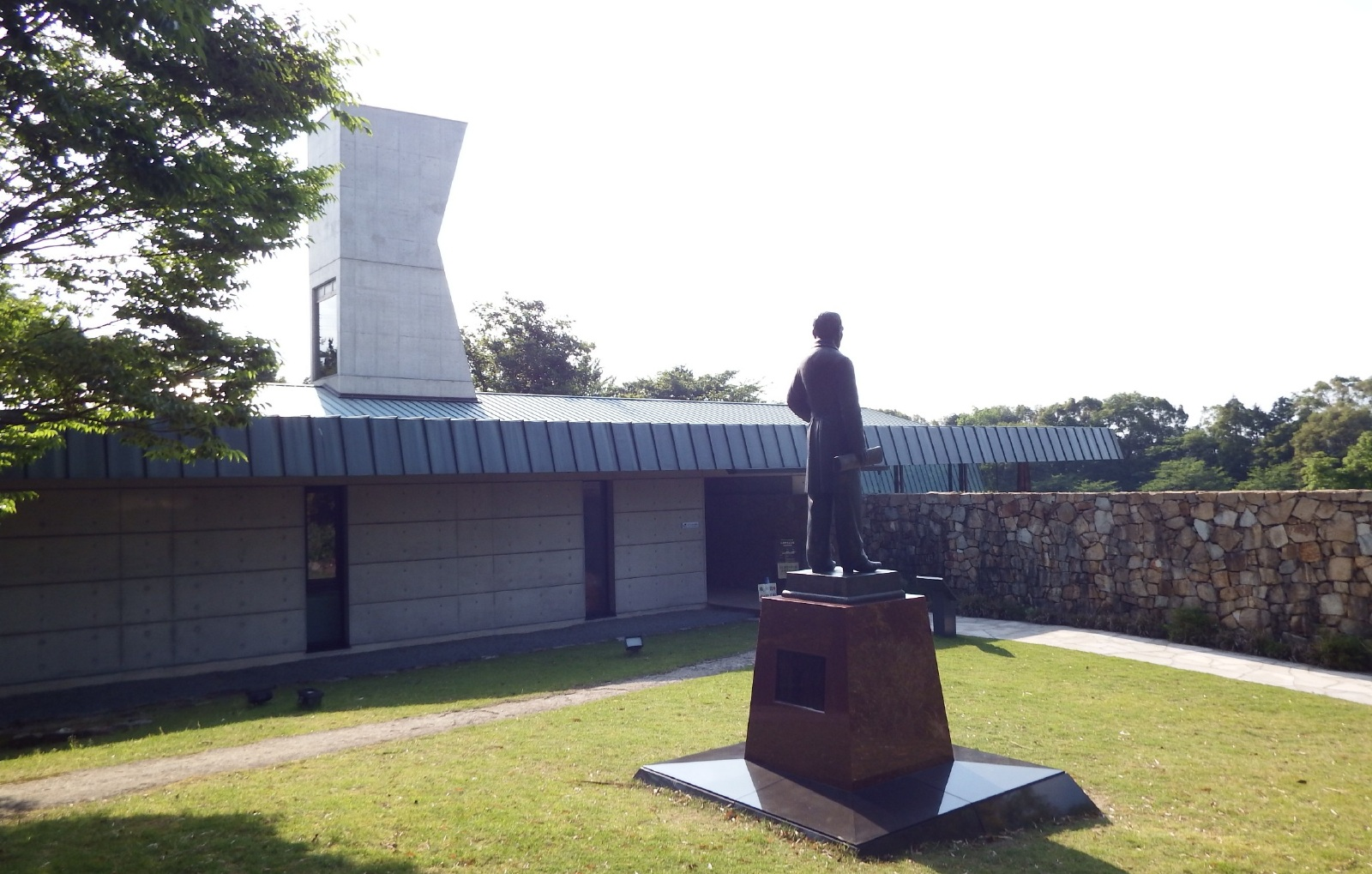 広瀬歴史記念館の展示室入口